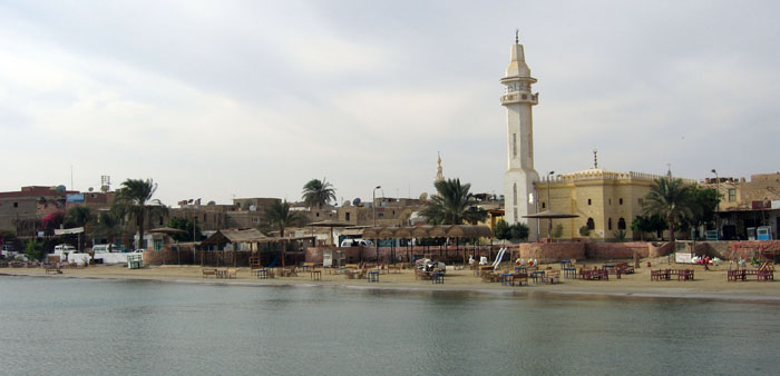 Promenade in Hurghada, Ägypten